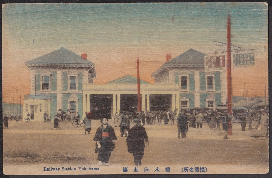 橫濱之風景